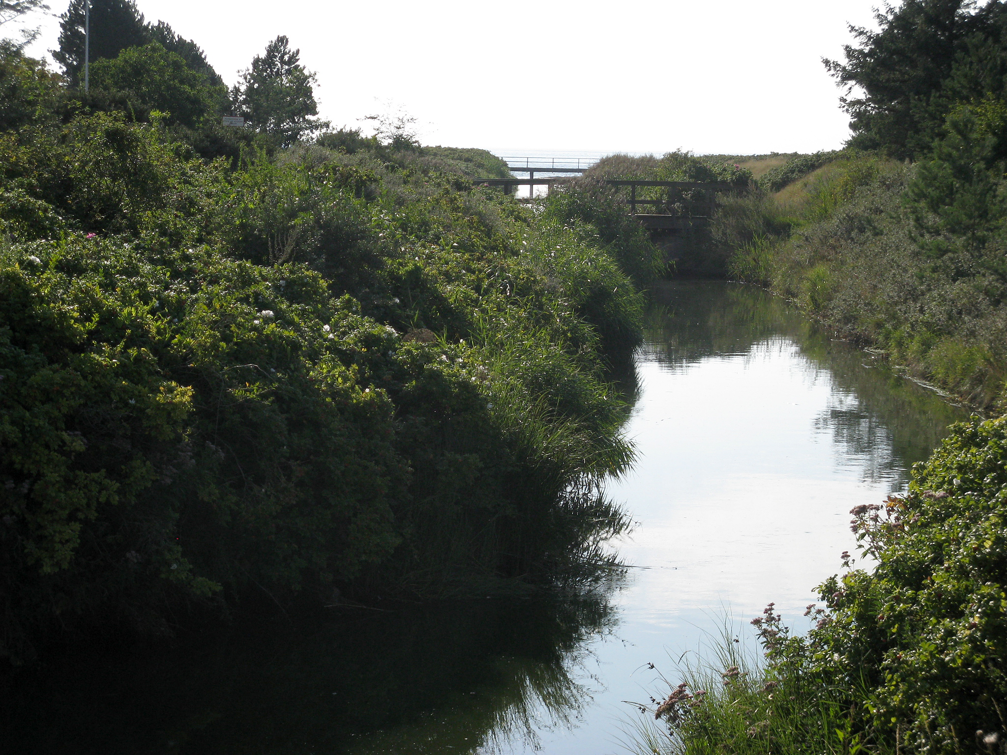 Kanal ved Osen, Kalundborg Kommune, mellem Hallemose Å og Storebælt.